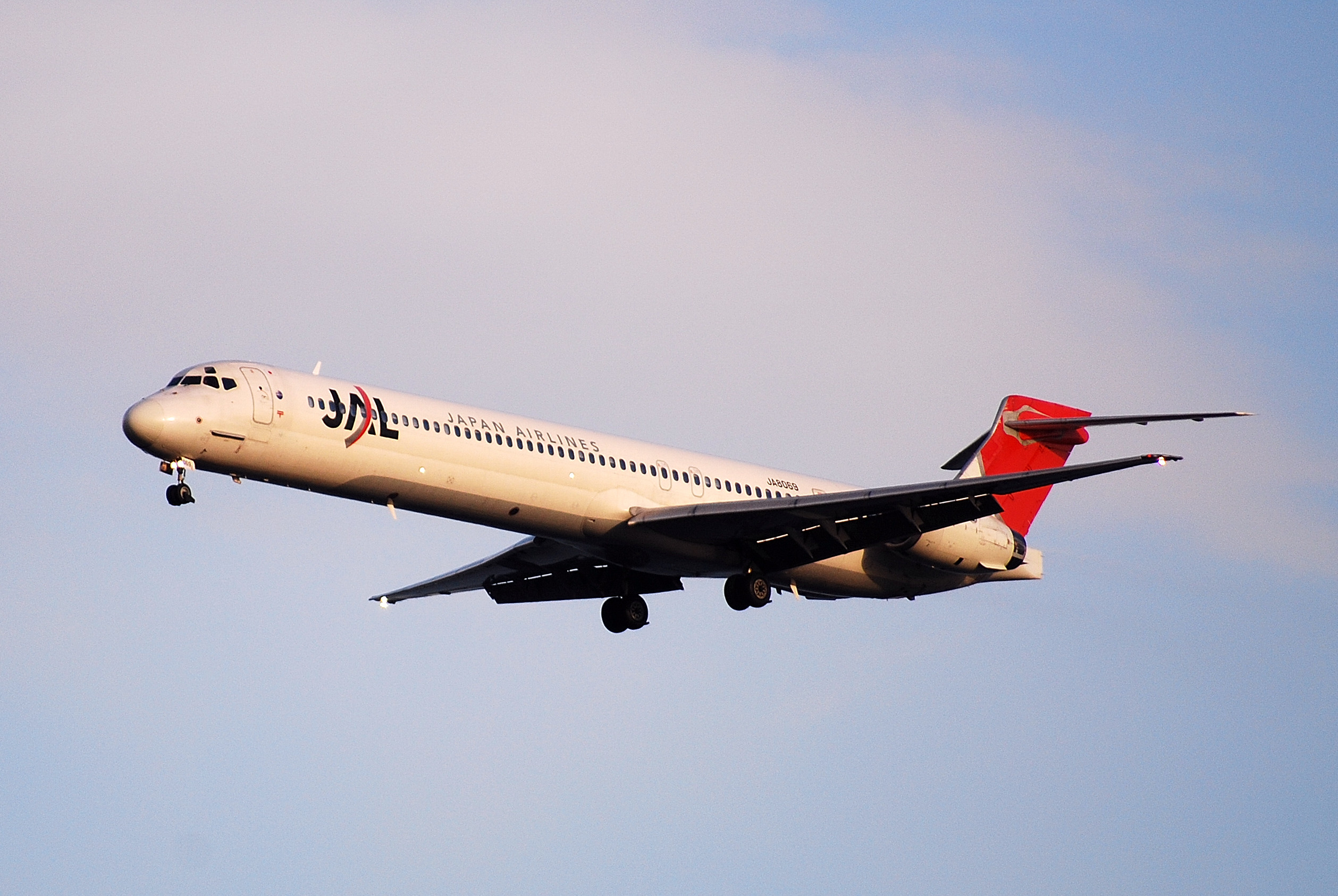 羽田空港に着陸する日本航空のMD-90